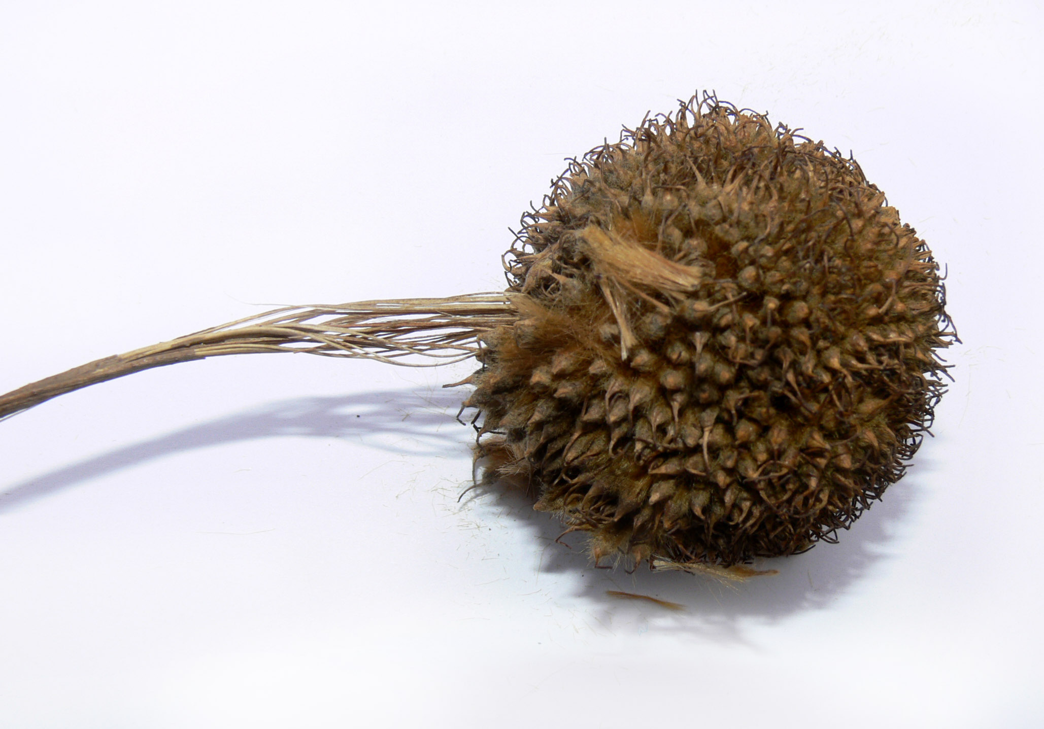 Platane, pédoncule retenant le fruit (Akène) à l'arbre ; à demi délité (en fin d'hiver, mi février)